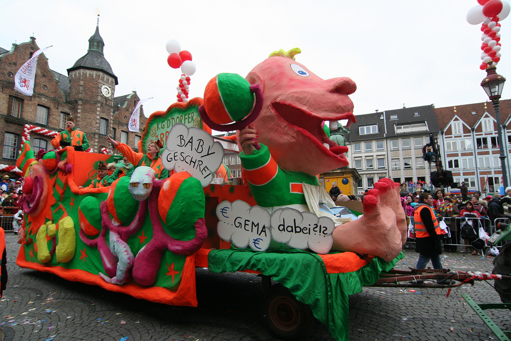 Düsseldorf Karneval 2013